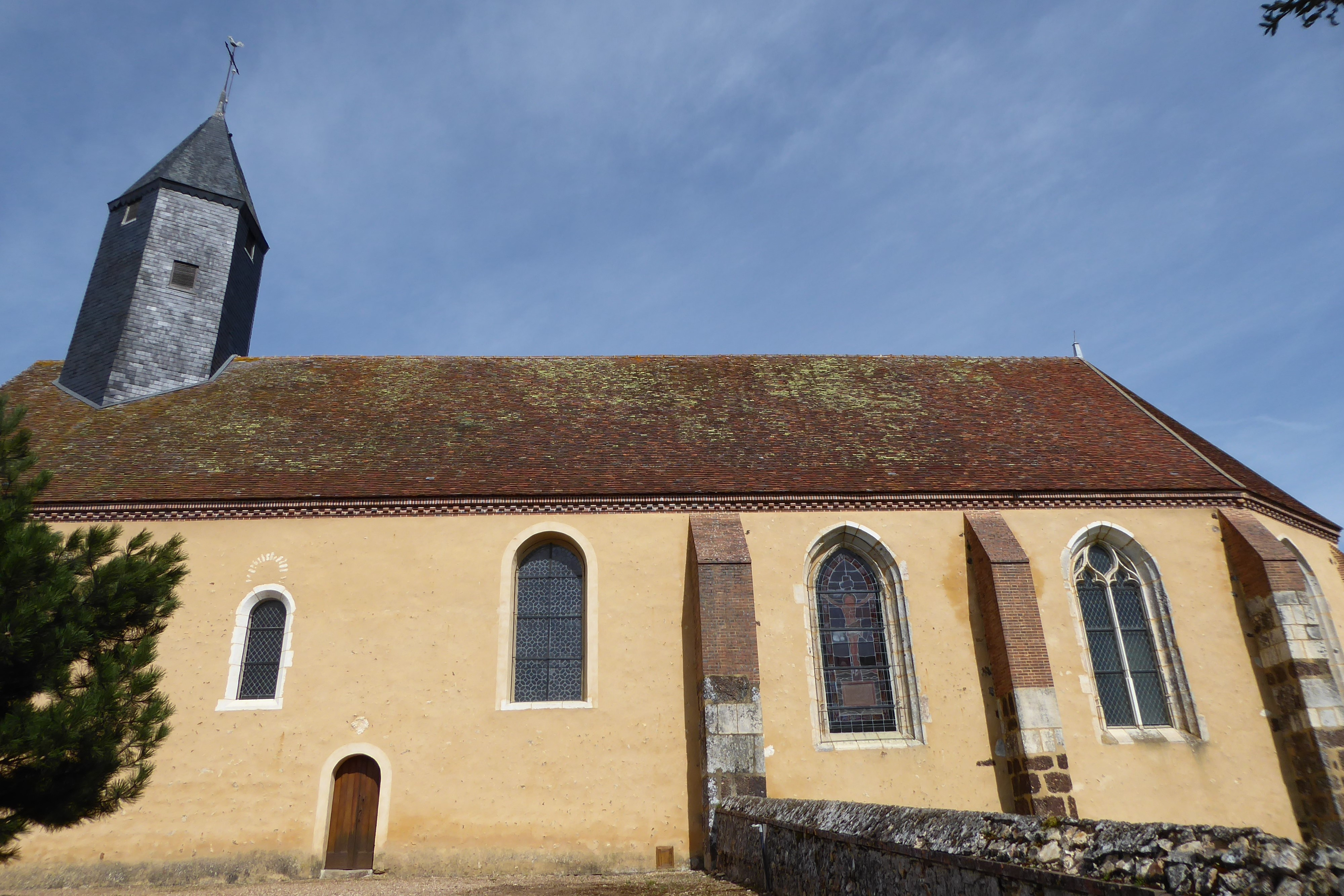 mur sud de l'église Saint-Michel, Saint-Ange, Eure-et-Loir, France.